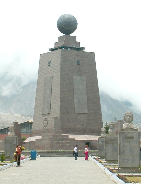 赤道碑(La Mitad del Mundo)的图片,三月份于摄于基多.